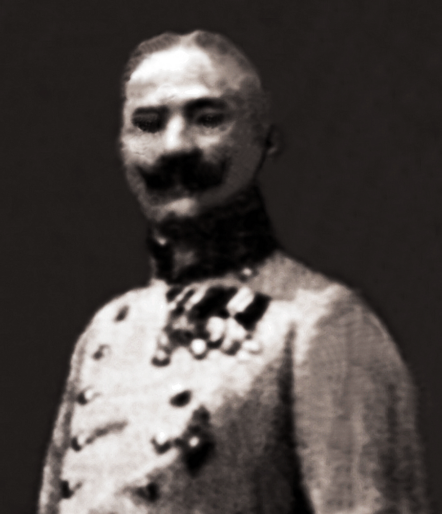 Dionysius Florianu von Oltrákovicza um 1918